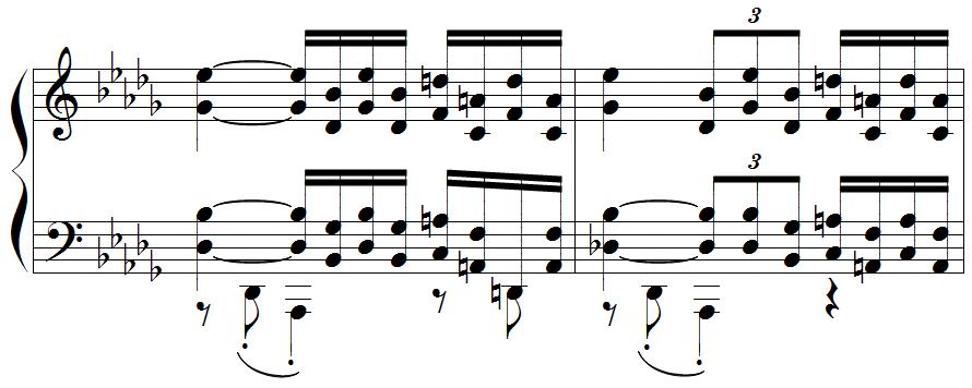 Debussy - Etude pour les sixtes, mes.10-11